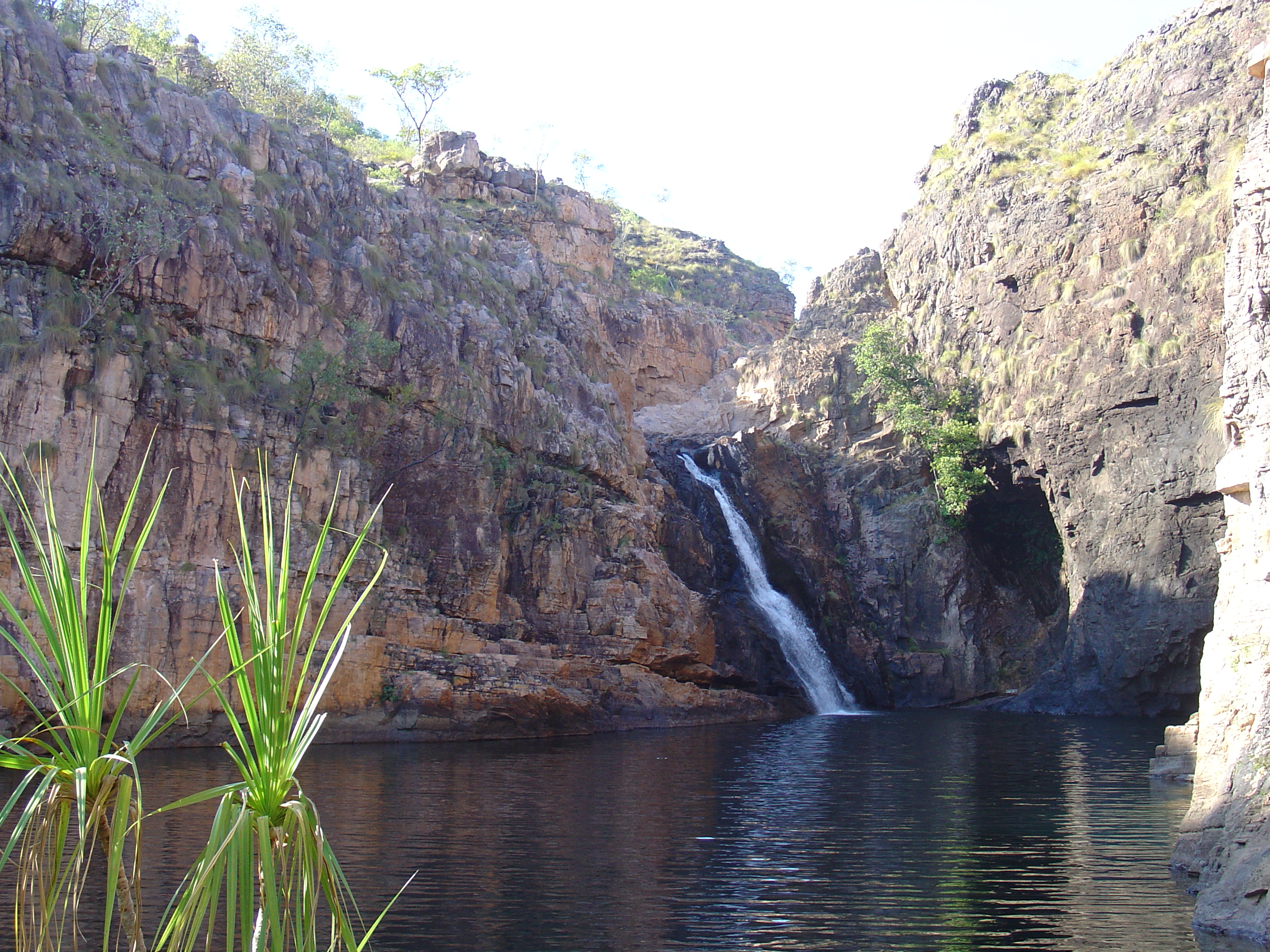 Maguk Gorge (Kakadu National Park Australia)